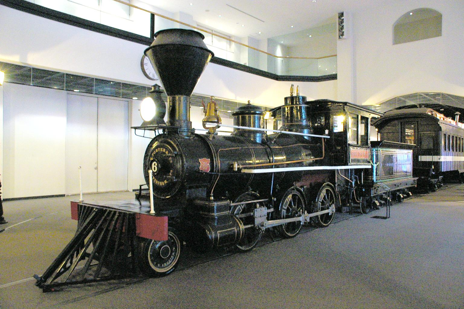 JNR 7106 "Shizuka" in Otaru synthesis museum.